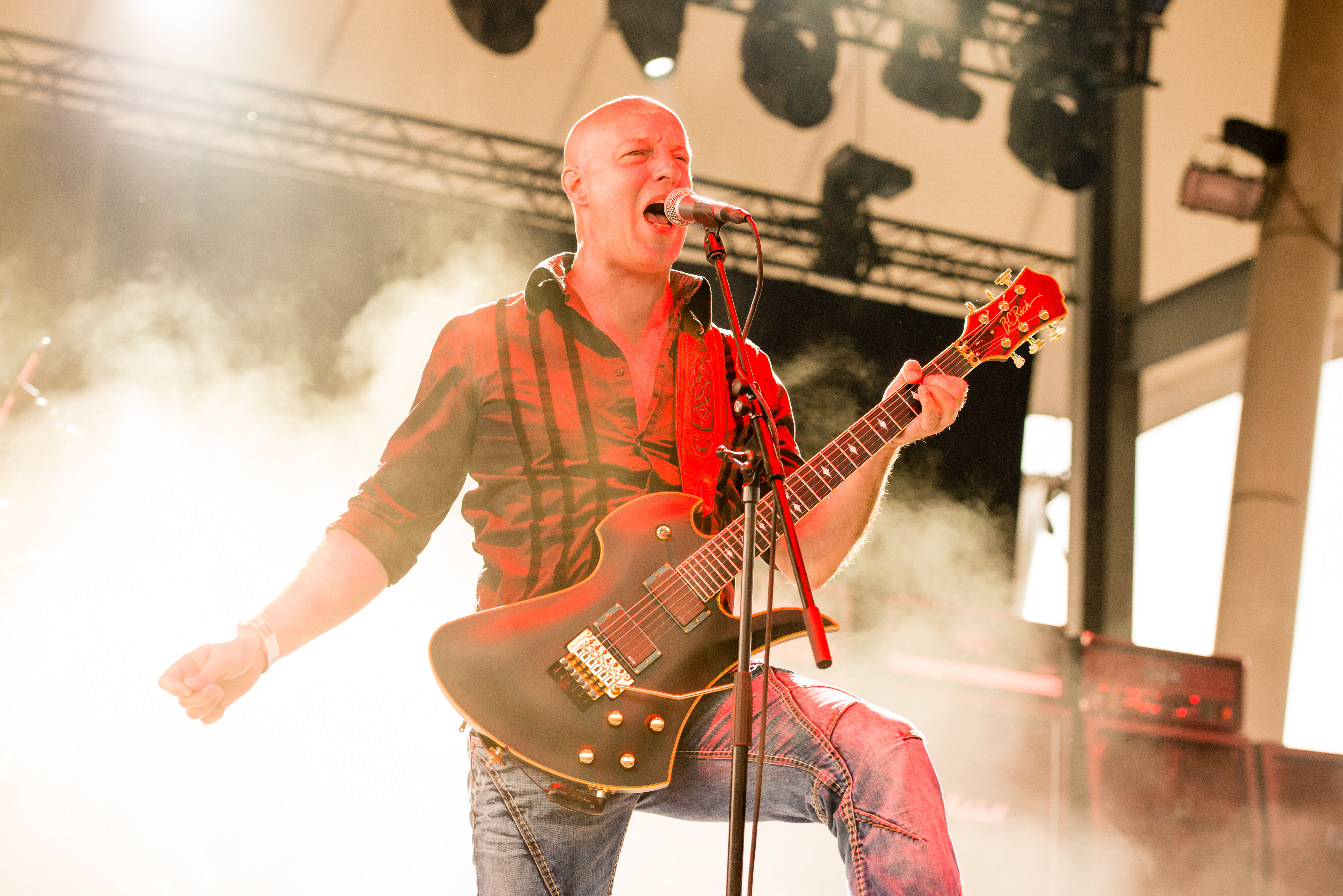 'Rock Hard Festival 2014 - Gelsenkirchen': 'Iron Savior'